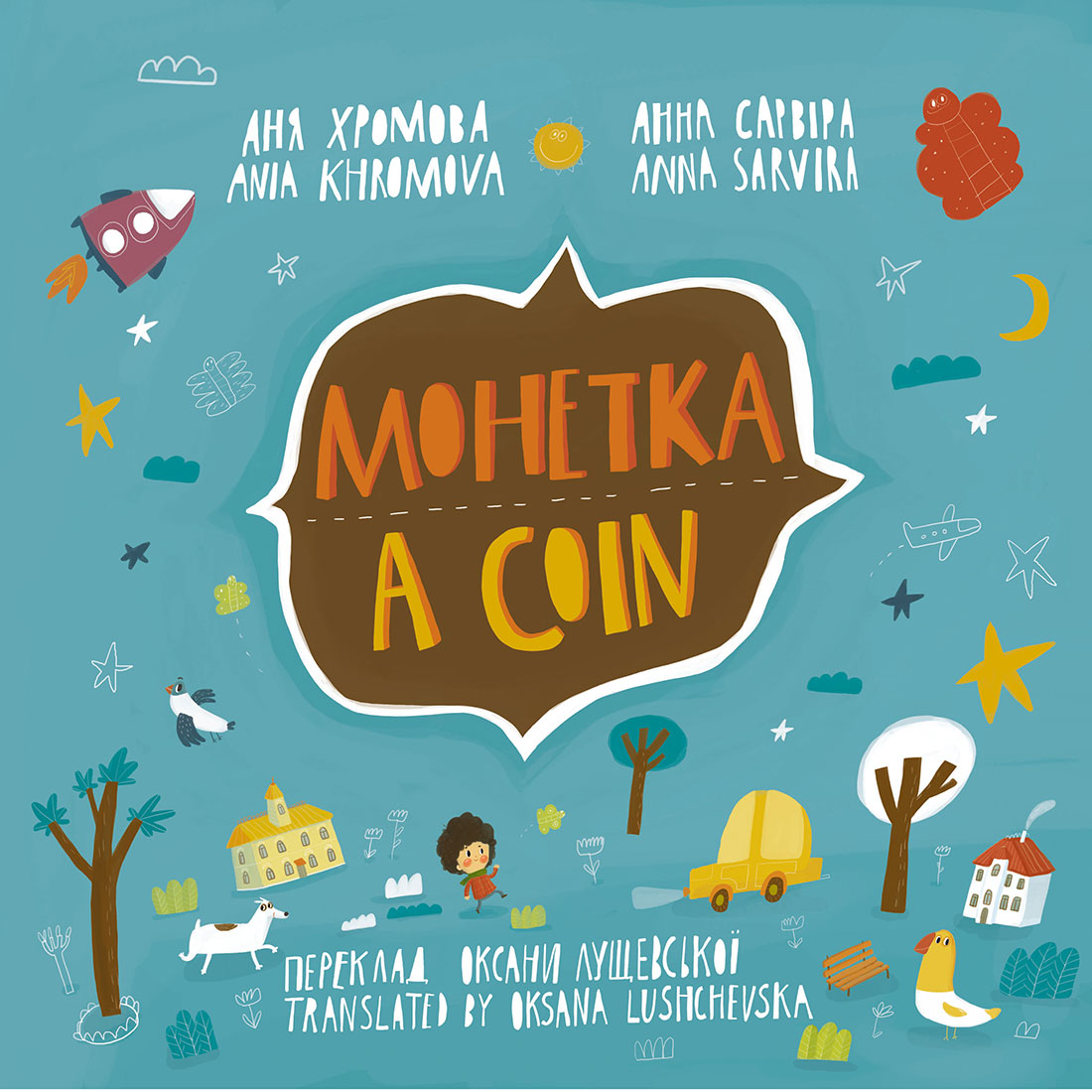 Книжка-картинка "Монетка" письменниці Ані Хромової та художниці Анни Сарвіри (2015)